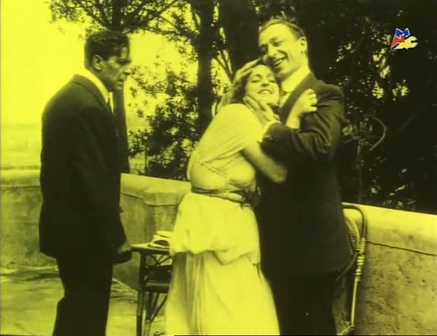 Description